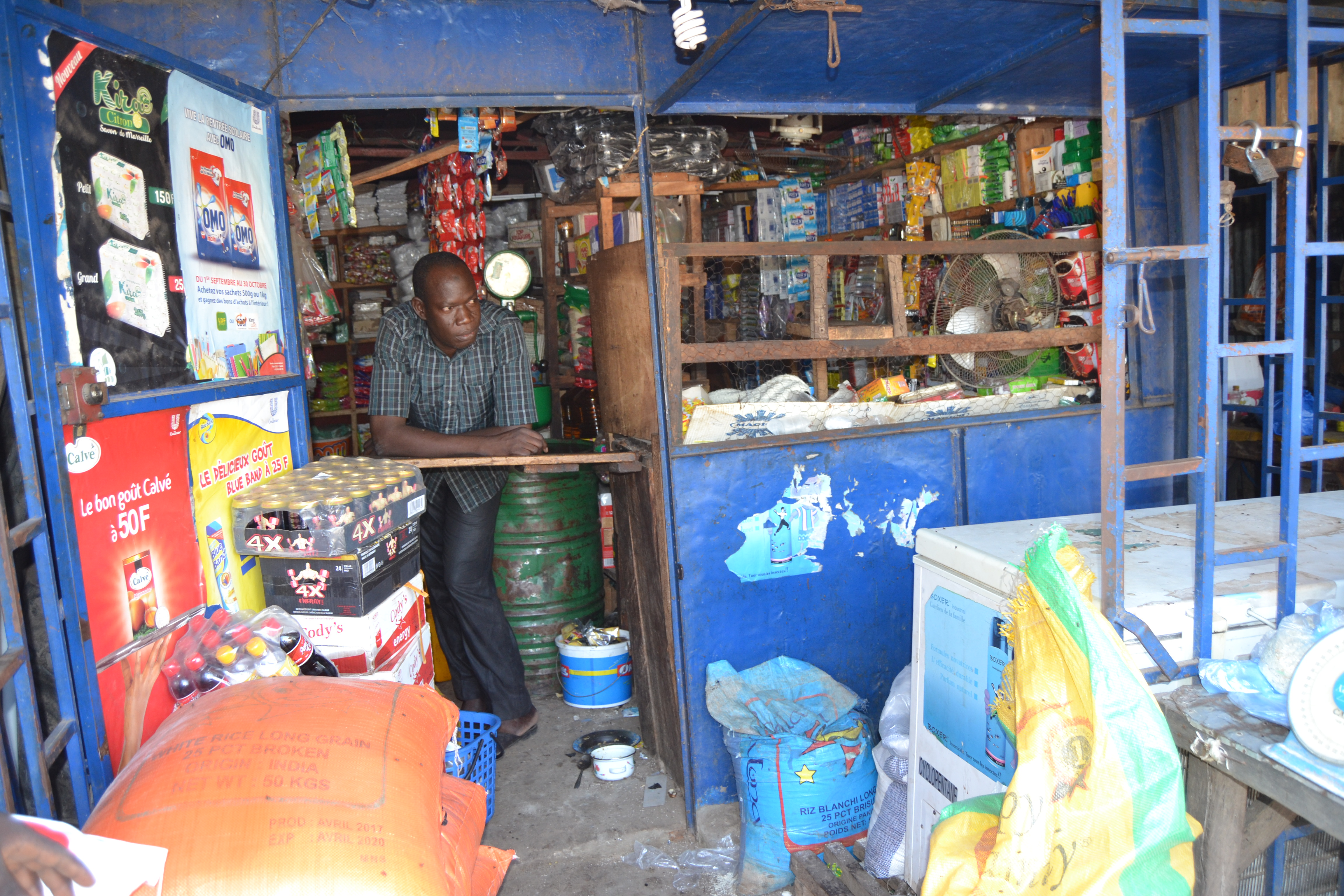 Un boutiquier en pleine journée de travail au marché de Ferké, une ville située au Nord de la Côte d'Ivoire. La ville est à environ 600 km d'Abidjan, la capitale économique ivoirienne. This is an image of "African people at work" from Ivory Coast